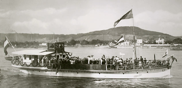 Eröffnungsfahrt der ersten elektrisch betriebenen Rheinfähre zwischen Godesberg (Bonn) und Niederdollendorf (Königswinter) am 11.07.1908; Aufnahme vom Godesberger Ufer.